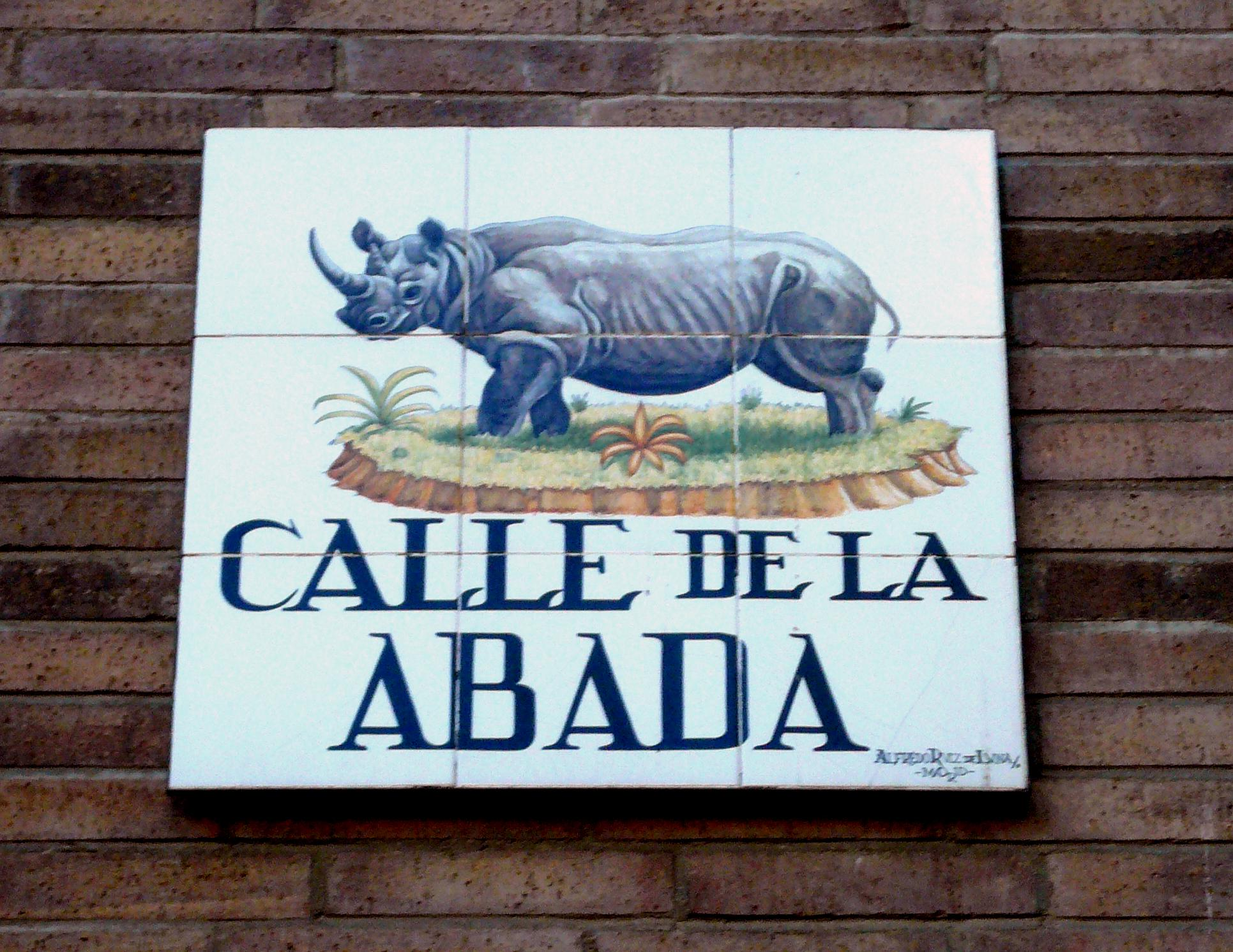 Azulejos que marcan la calle de la Abada en Madrid. Representa un rinoceronte. Firmado por Alfredo Ruiz de Luna, Madrid.